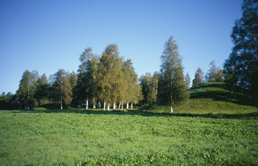 Foto: Kabam.